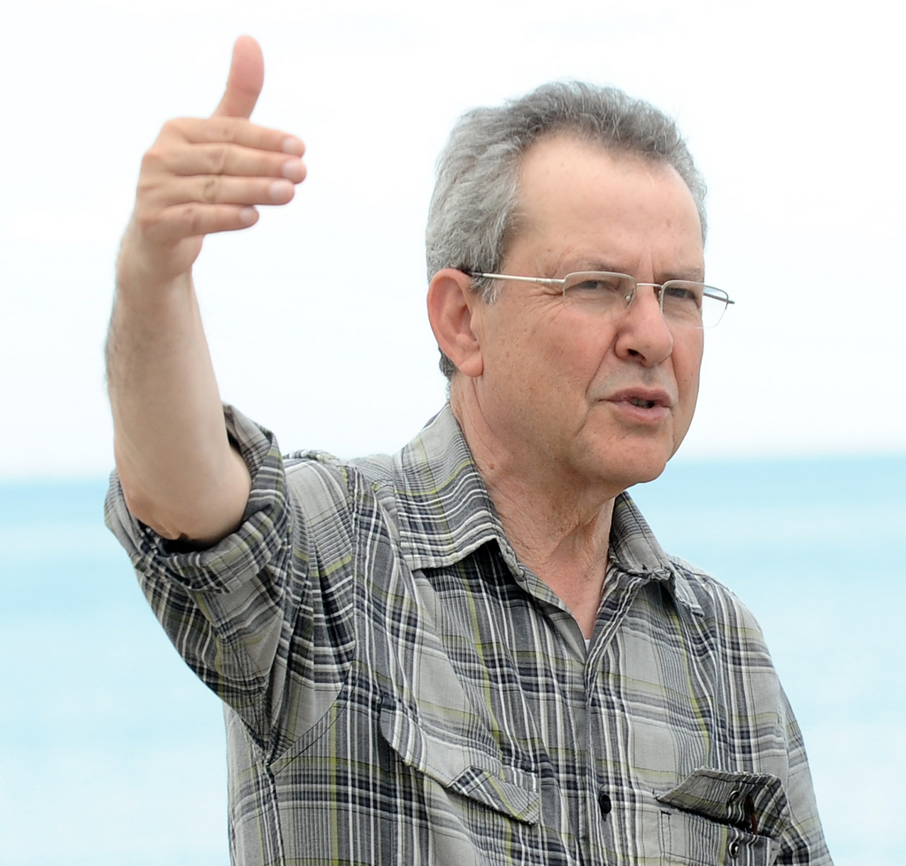 image